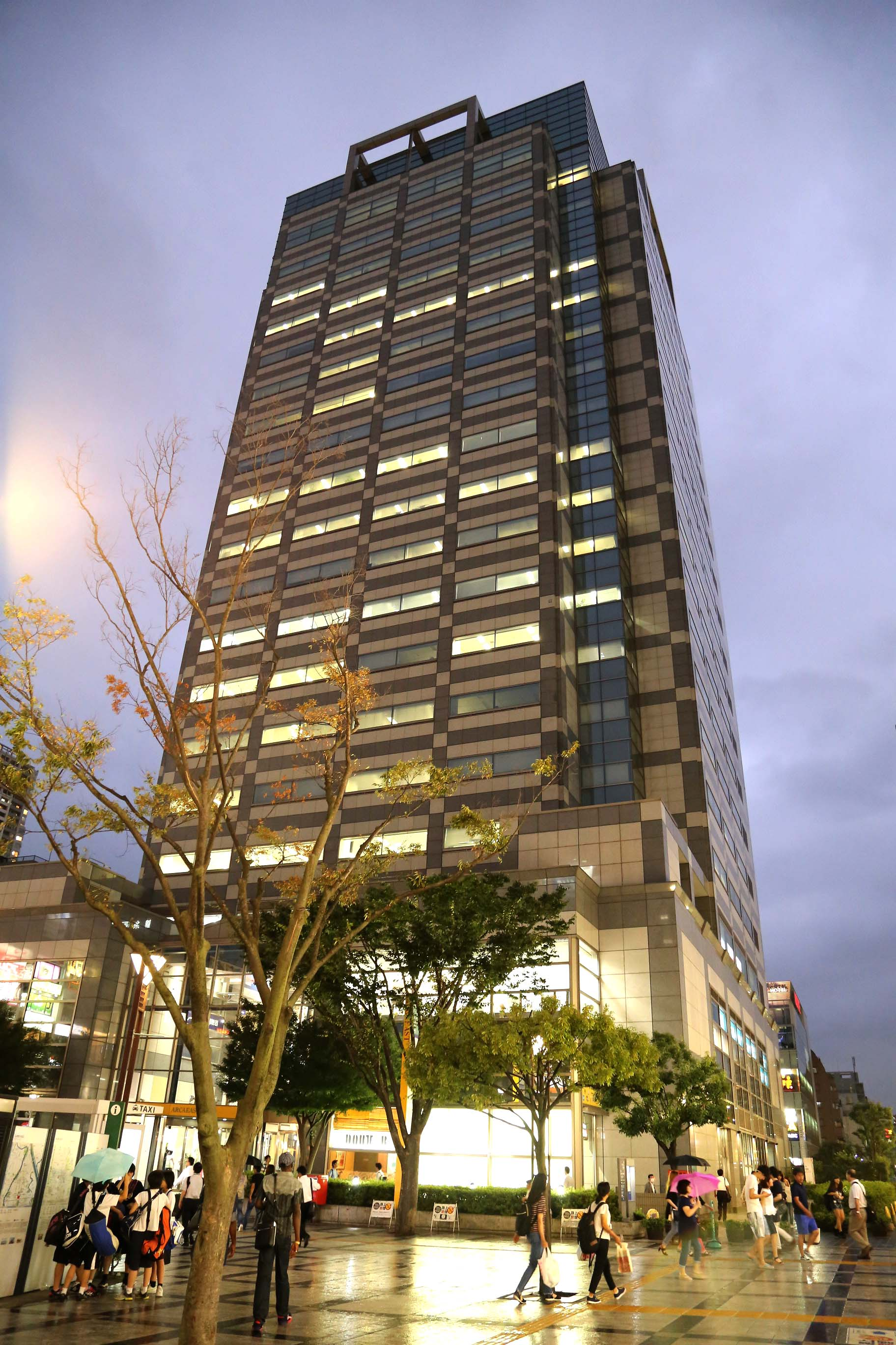 東京都墨田区錦糸町３－２－１アルカイースト